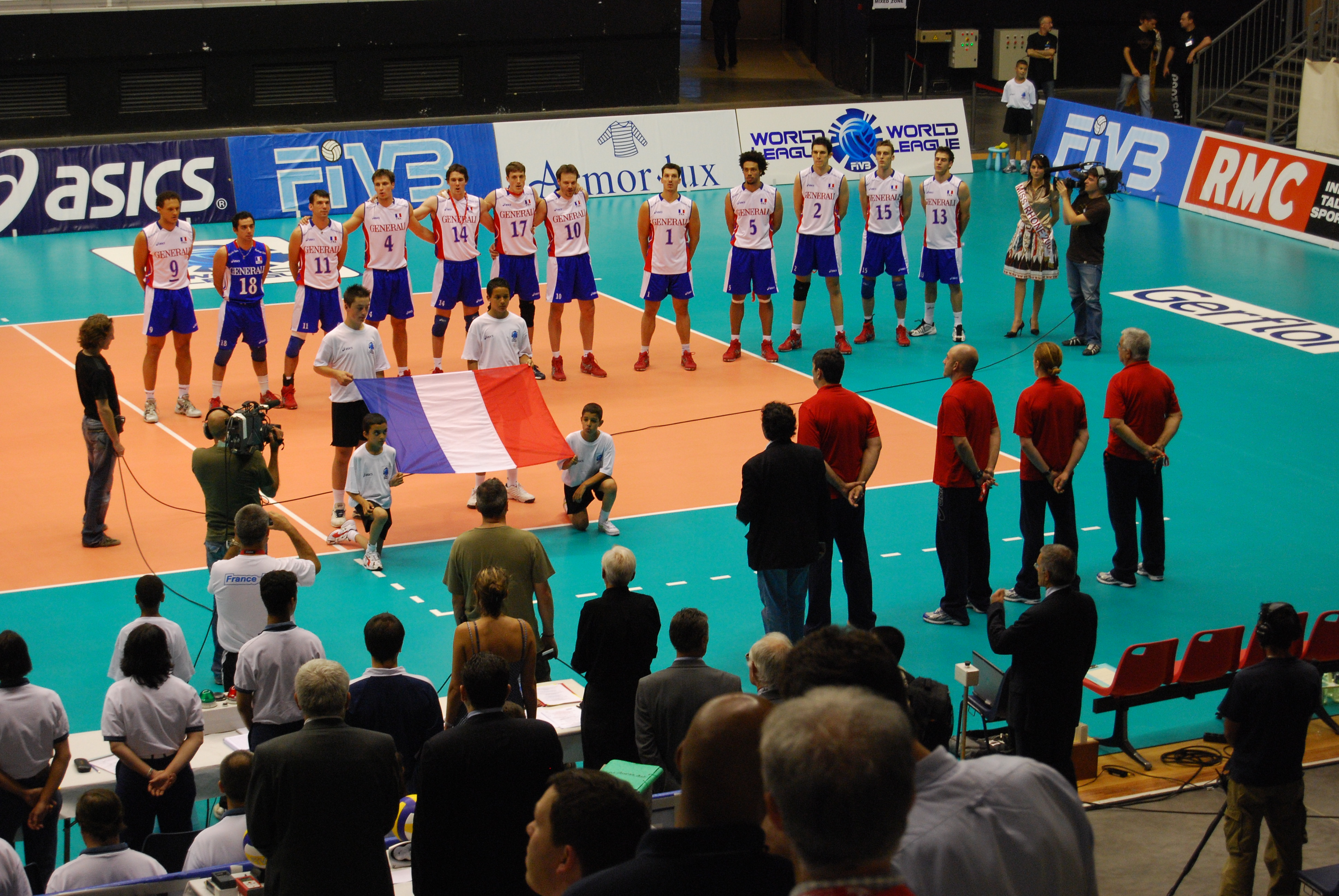 équipe de France de Volley-ball, Ligue Mondiale 2007 France-USA 8 juin 2007 Lyon